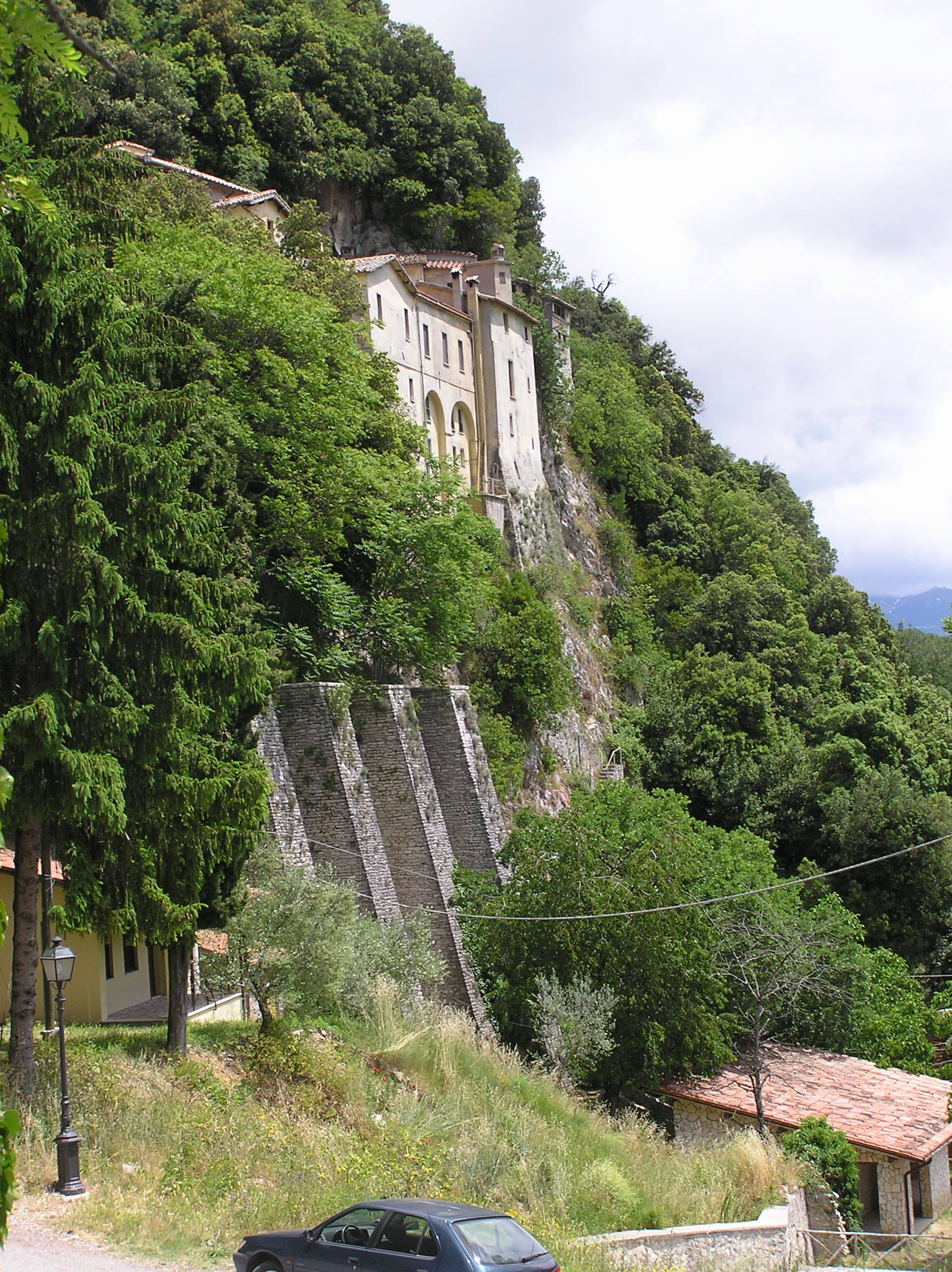 Greccio Convent